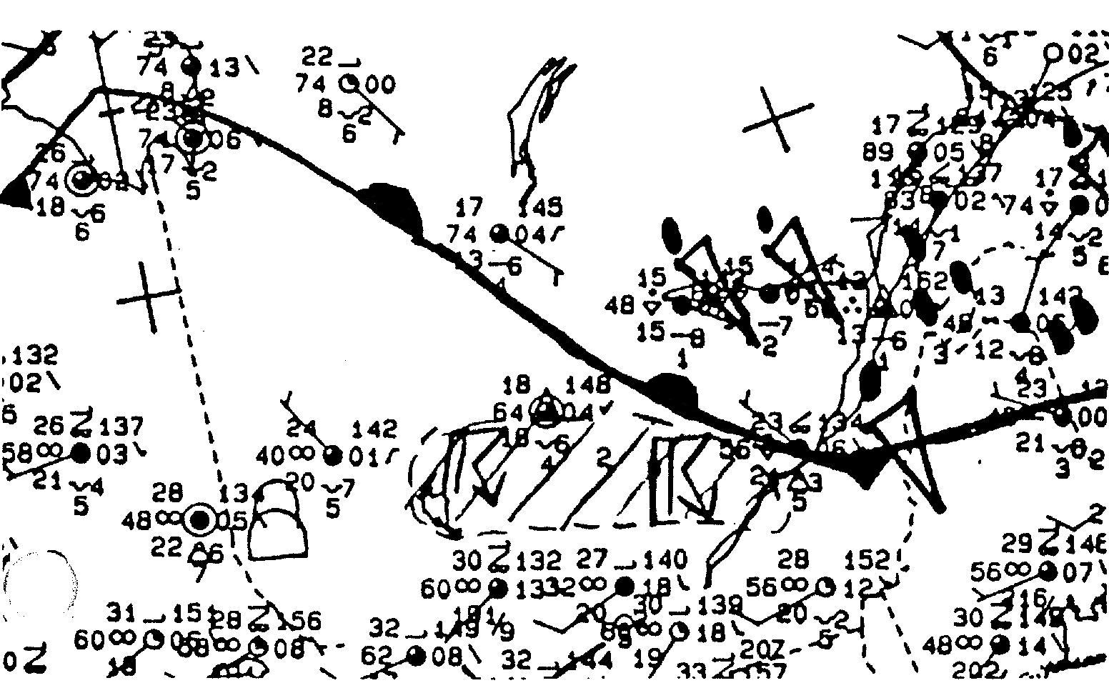 Carte de surface du 27 août 1991 à 21 TUC centrée sur le sud du Québec, Canada, lors de la Tornade de Maskinongé. Elle montre la position du front chaud (ligne noire avec festons ronds) allant de la Baie James vers le Maine. Les données des stations d'observations sont pointées et montrent que la température était de 27 à 30C au sud du front avec des points de rosée de 20 à 23 C. La zone d'orages est montrée en hachuré avec les signes .